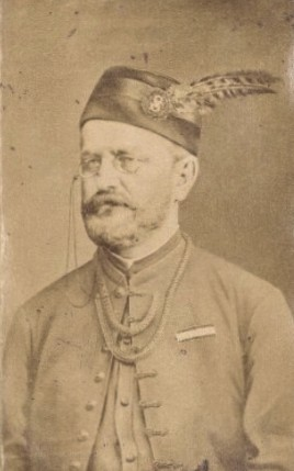 Antonín Choděra (1837-1887), český sokolský funkcionář a politik, poslanec Českého zemského sněmu